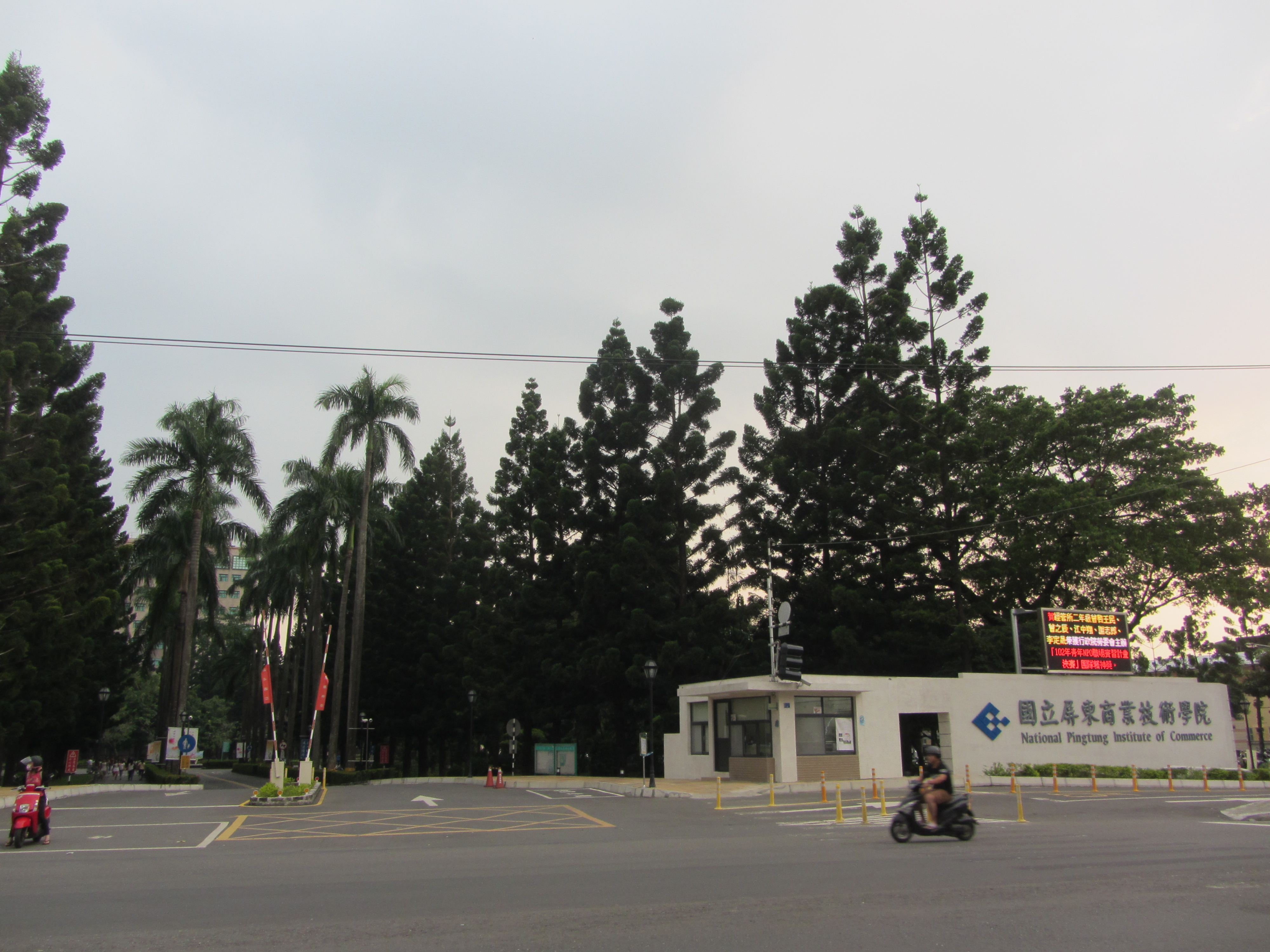 國立屏東商業技術學院，位於臺灣屏東縣屏東市民生東路51號，2014年8月1日改為國立屏東大學屏商校區。